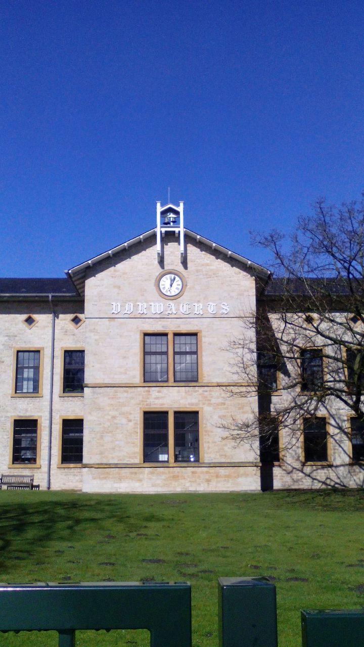 Gebäude der Spinnerei Vorwärts Bielefeld. Erbaut 1851.